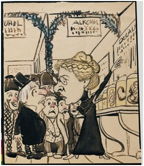 Schnitzelbankzettel, Mischtechnik